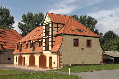 Brennerei des Rittergutes Benndorf